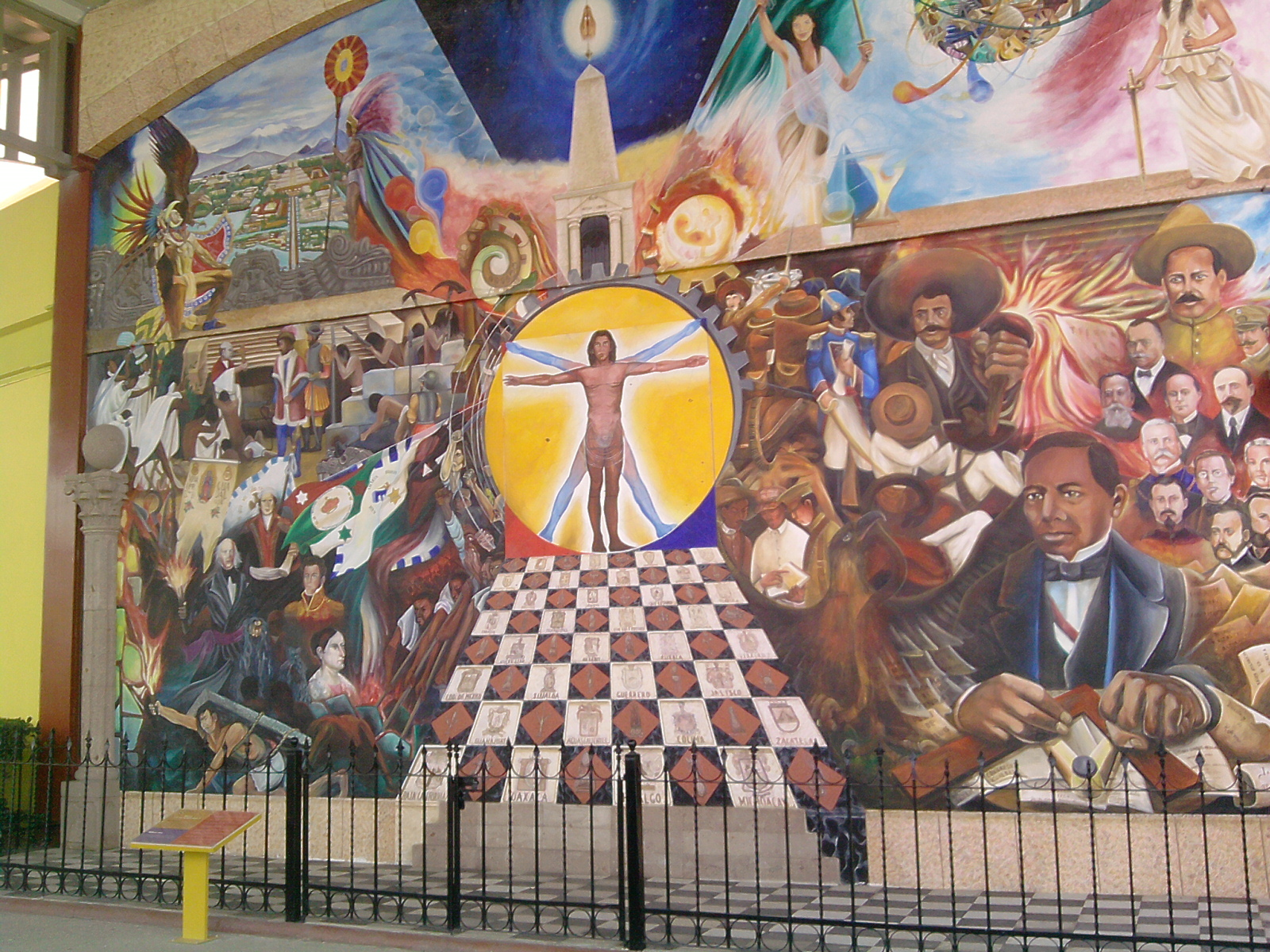 Mural en la entrada del Museo el Rehilete, Mexico.